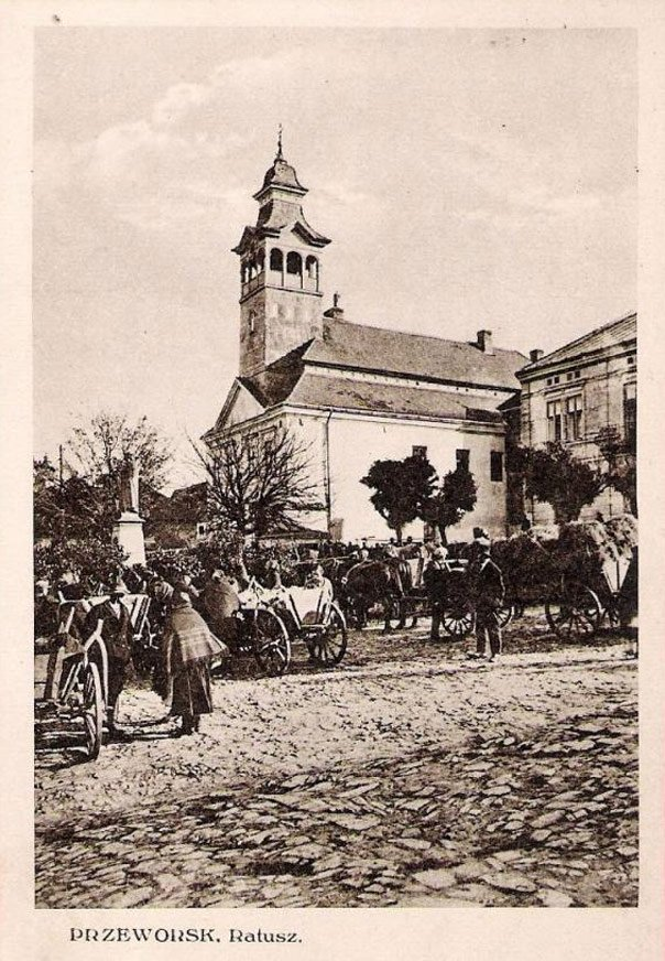 Ratusz w Przeworsku - fot. archiwalna